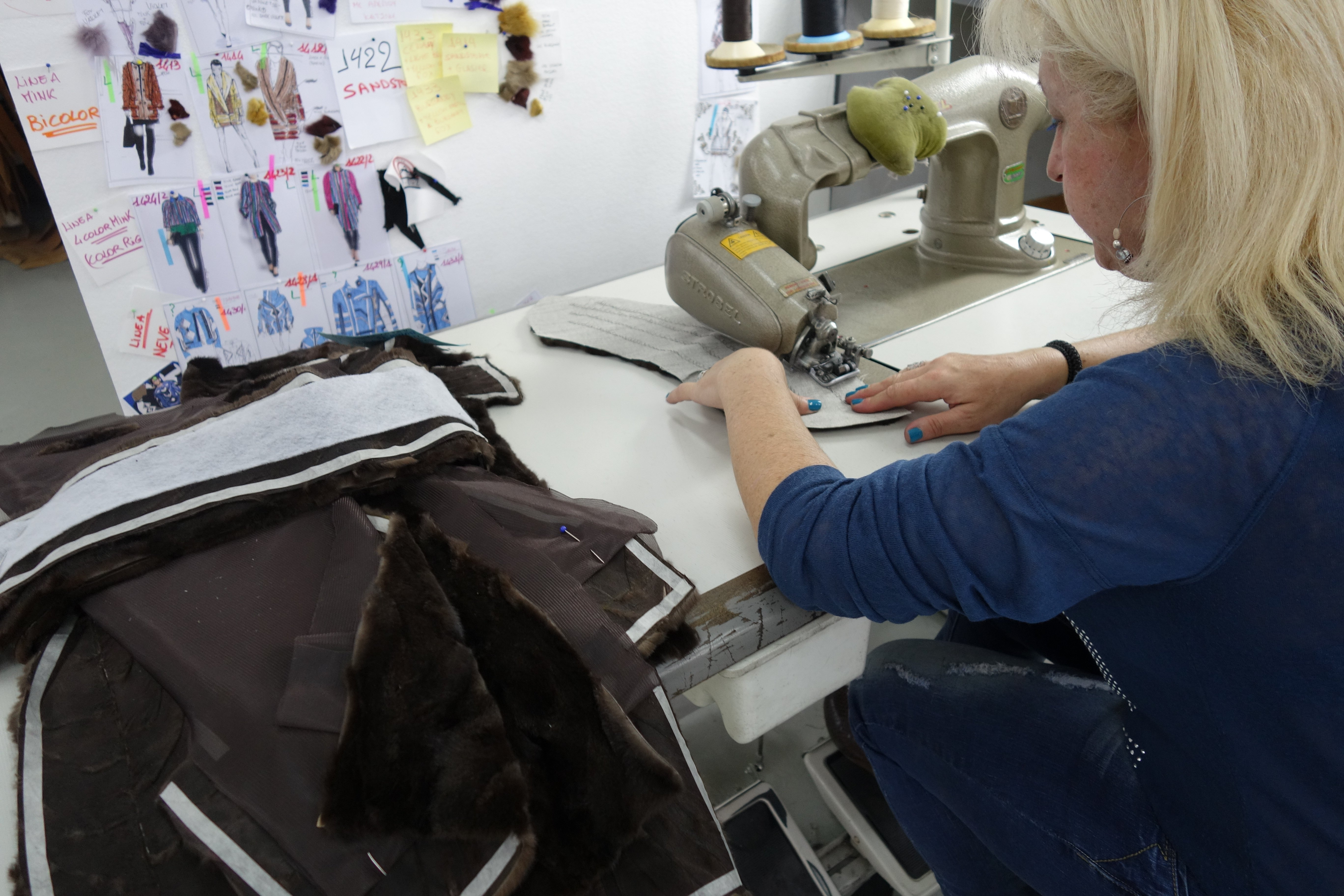 Kürschner in der Stadt Kastoria, Griechenland. PKZ Furs SA., Christos Papadopoulos. Pikieren eines Nerzstücken-Unterkragens mit der Pelz-Pikiermaschine.